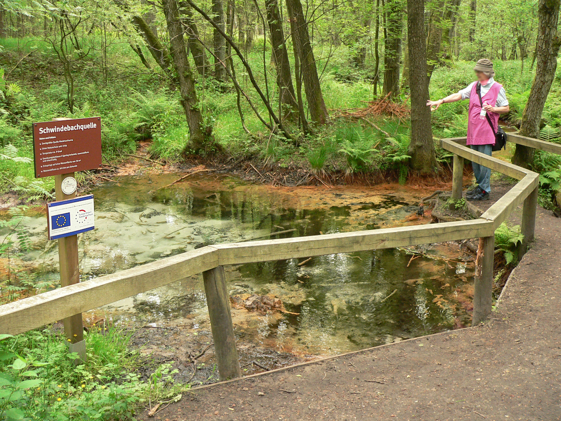 Schwindebachquelle